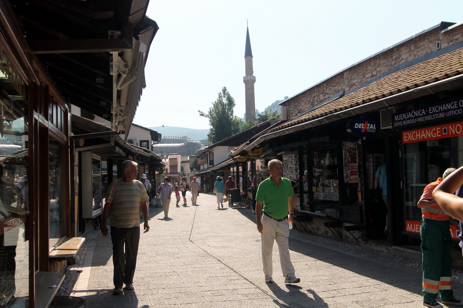 IMG_5565Bosznia_Szarajevo